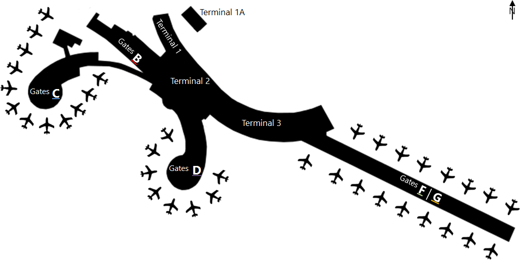 Check-in- und Gate-Bereiche des Flughafen Wien. Jedes Flugzeug steht für eine Fluggastbrücke.